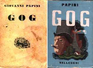 Copertina de romanzo di Giovanni Papini Gog, collana Opere di Giovanni Papini IX, Vallecchi Editore, 1931